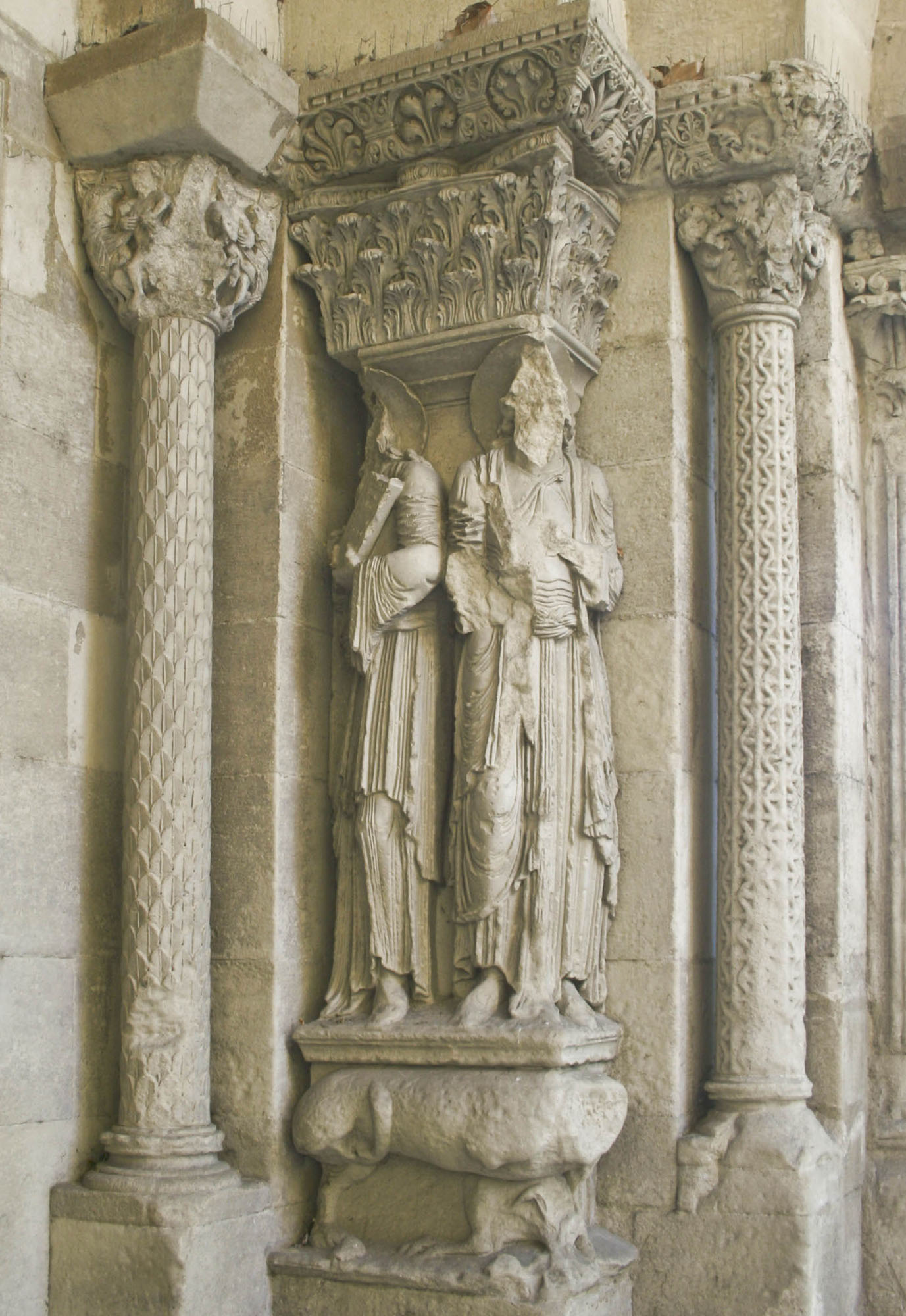 Sculptures romanes, portail de la collégiale Saint-Barnard de Romans-sur-Isère, Drôme, France